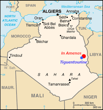 Carte Algérie Prise d'otage à In Amenas (Base de vie de Tiguentourine) le 13 janvier 2013